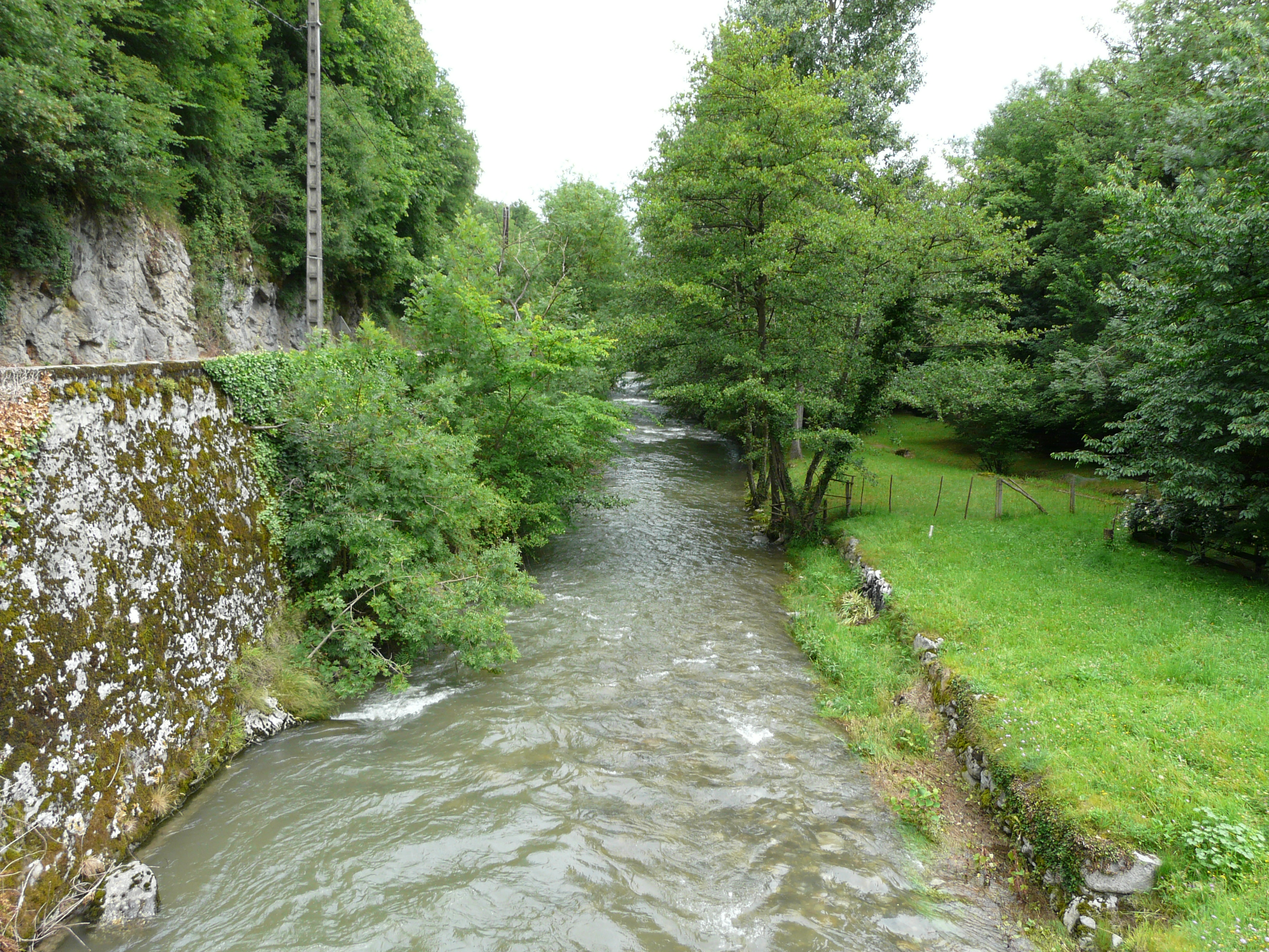 L'Ourse le long de la route départementale 925 à Bramevaque, Hautes-Pyrénées, France.